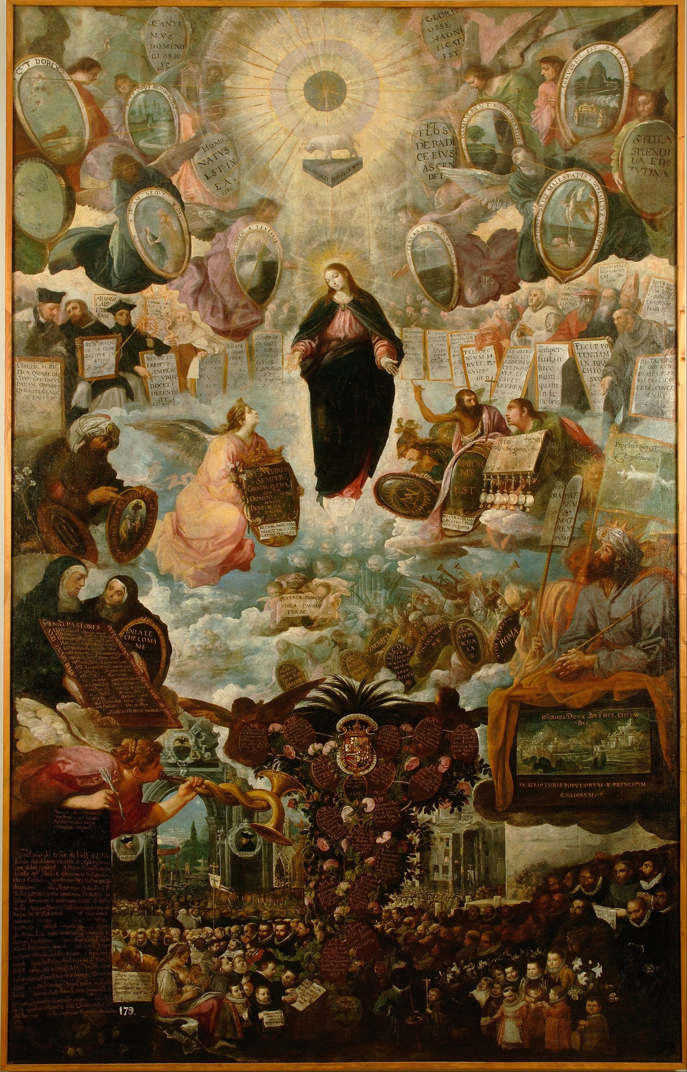 El lienzo muestra una representación alegórica de la Inmaculada Concepción de la Virgen María.